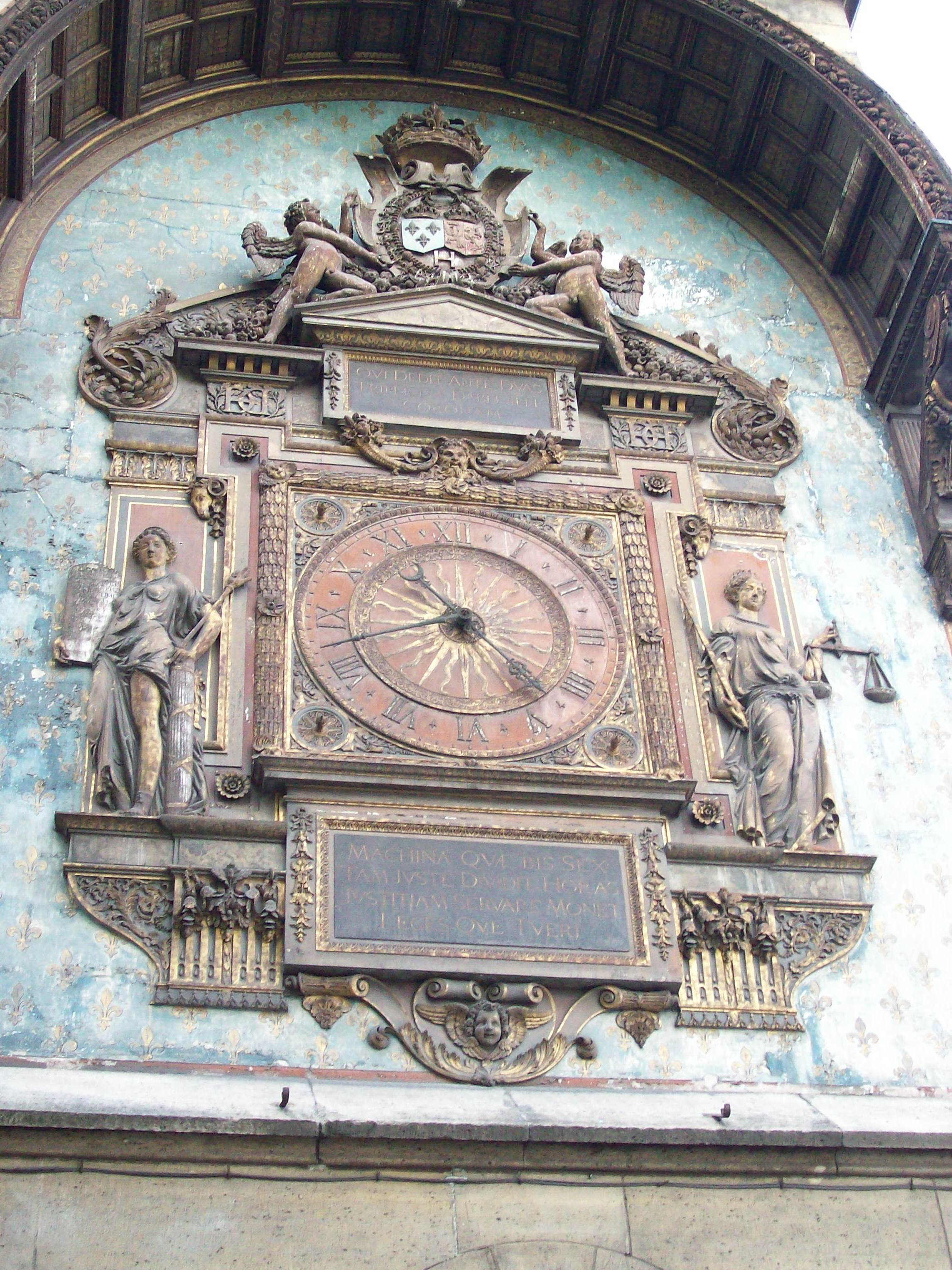 Première horloge publique de Paris, Tour de l'Horloge, XVIème siècle